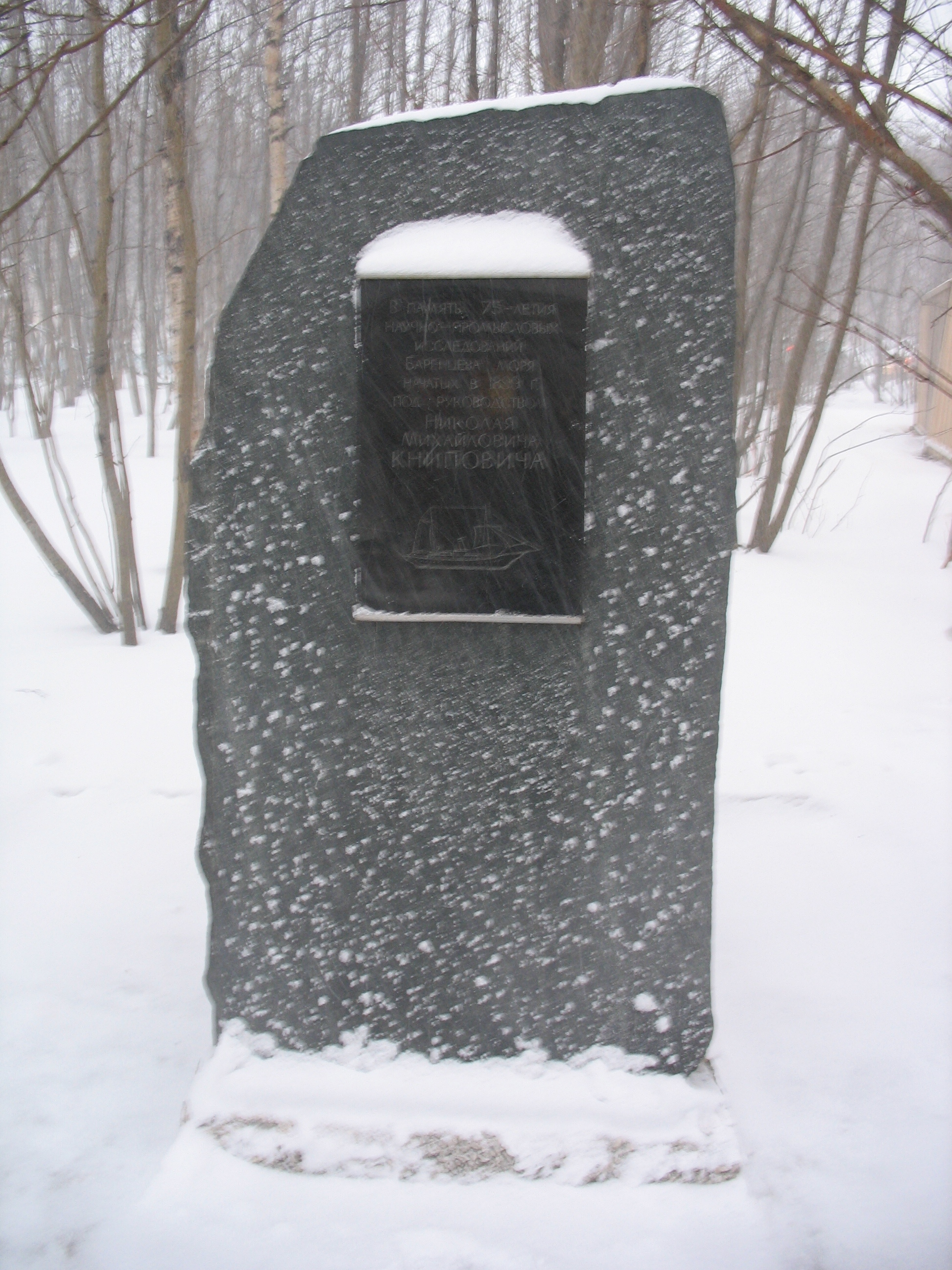 В память 75-летия научно-промысловых исследований Баренцева моря, начатых в 1899 г. под руководством Николая Михайловича Книповича.